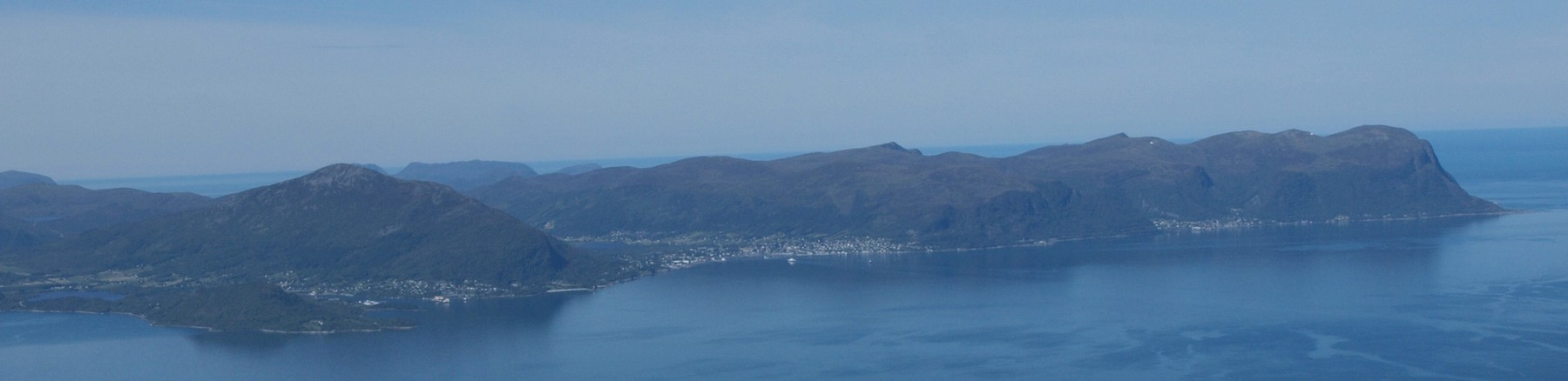 Hareidlandet, Sunnmøre